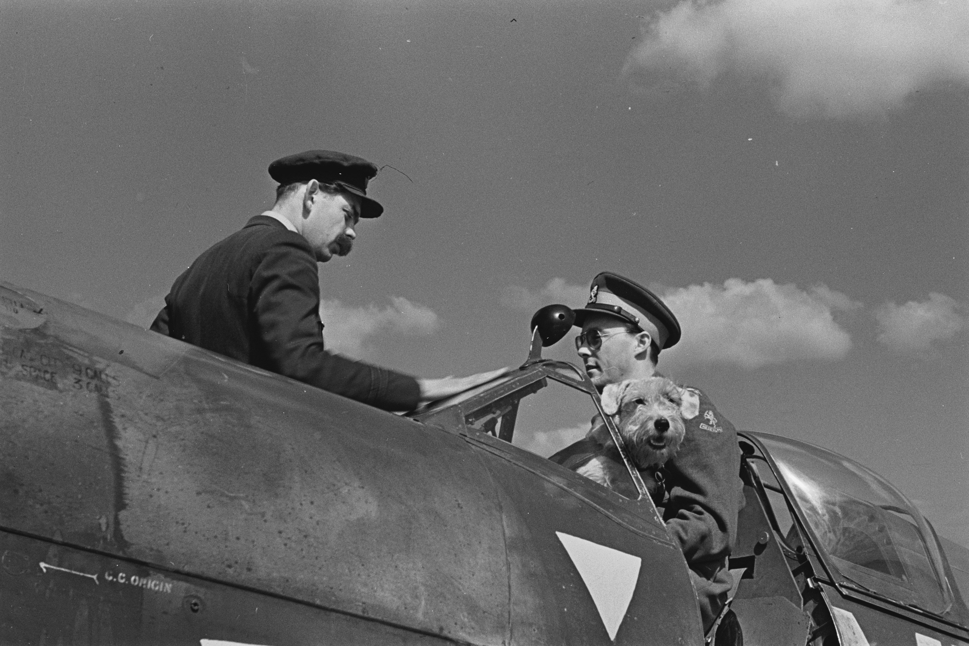 Collectie / Archief : Fotocollectie Anefo Reportage / Serie : [ onbekend ] Beschrijving : Prins Bernhard tijdens een bezoek aan het Nederlandse Spitfire squadron (322 Dutch Squadron RAF) op een RAF basis ergens in Engeland [RAF Hartford Bridge] Annotatie : Hij zit samen met zijn hond Martin Datum : mei 1944 Locatie : Groot-Brittannië, Hartford Bridge Trefwoorden : luchtmacht, prinsen, squadrons, tweede wereldoorlog Persoonsnaam : Bernhard, prins Instellingsnaam : RAF, Spitfire Fotograaf : [onbekend] Auteursrechthebbende : Nationaal Archief Materiaalsoort : Negatief (zwart/wit) Nummer archiefinventaris : bekijk toegang 2.24.01.05 Bestanddeelnummer : 934-8789